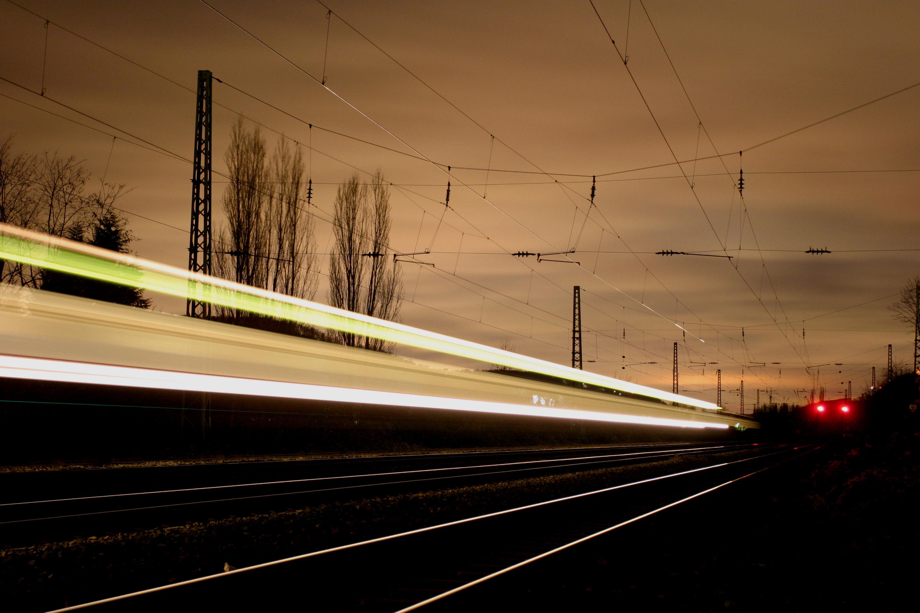 Langzeitbelichtung eines Zuges der Baureihe 425 vor dem Bahnhof Unkel in Unkel am Rhein (25 Sekunden bei ISO 400)